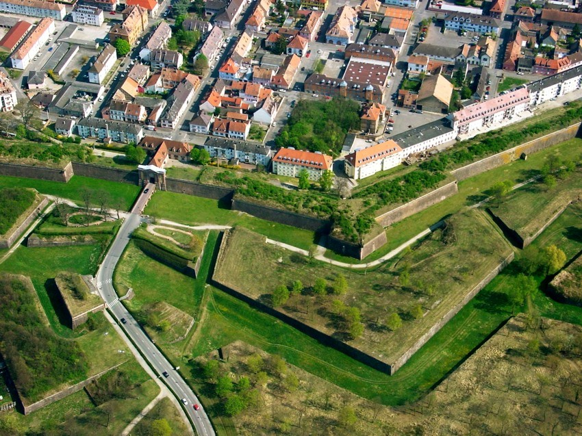 Luftbild von Neuf-Brisach aufgenommen bei einer Ballonfahrt